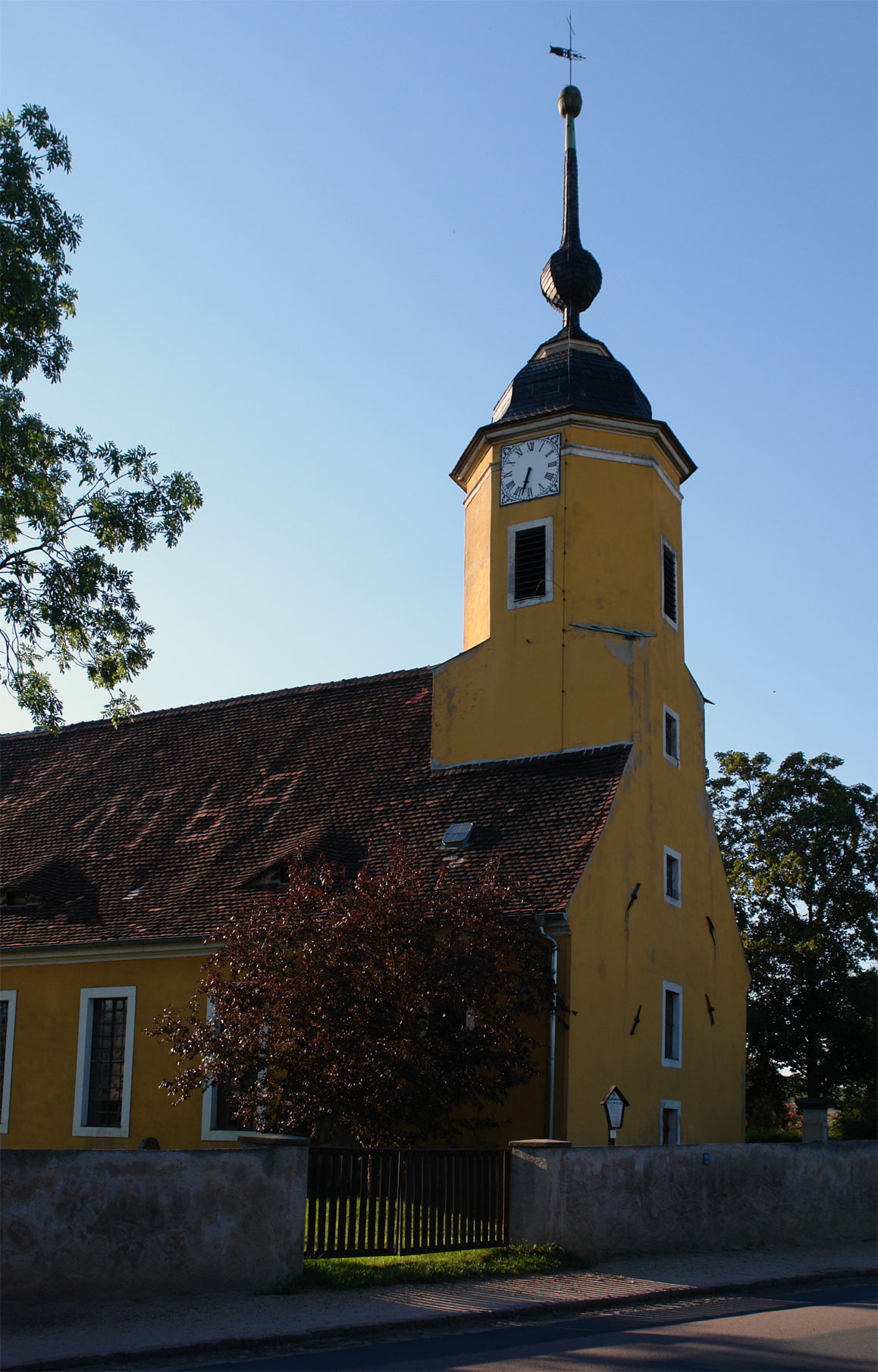 Pfad+Objekt: Deutschland / Sachsen_BL / Dresden_RB / Meißen_Lk / Niederau - Oberau, Kirche. Tags: B101 S80 S177 Bauwerk Gebäude Kirche